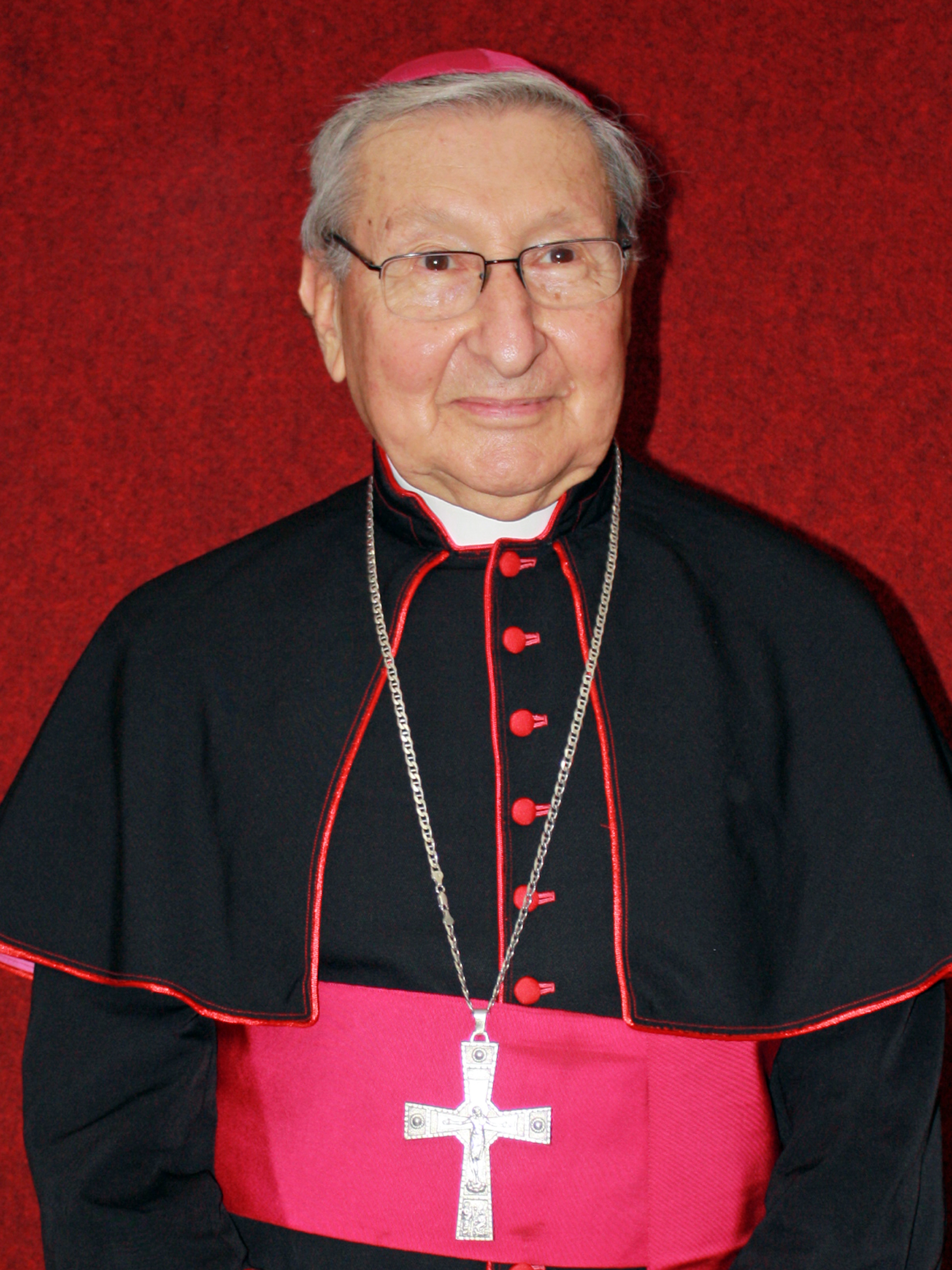 Monsignore Ugo Eugenio Puccini Banfi (* 1939), seit 1988 Bischof der kolumbianischen Diözese Santa Marta